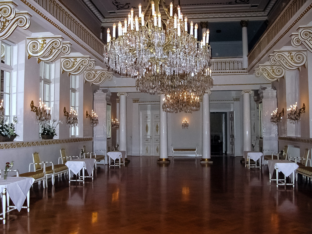 Presidentinlinna sisältä. This is a photo of a monument in Finland identified by the ID 'Presidential Palace' (Q608346)